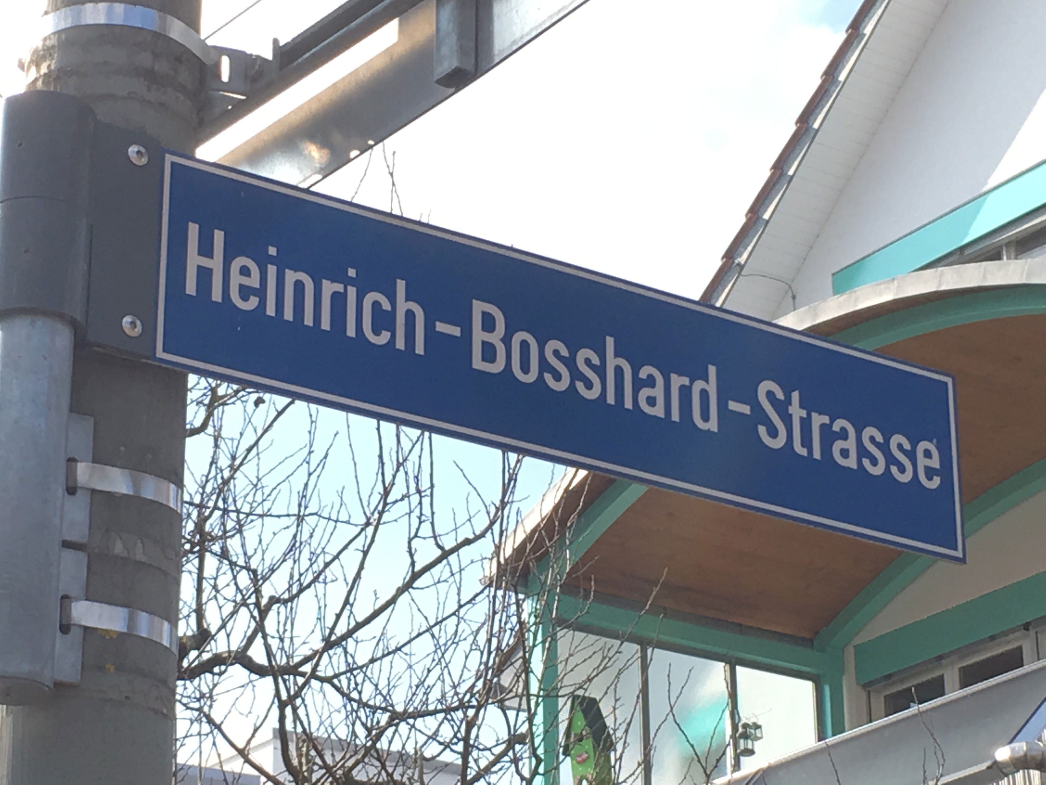 Strassenschild der Heinrich-Bosshard-Strasse in Winterthur, Schweiz